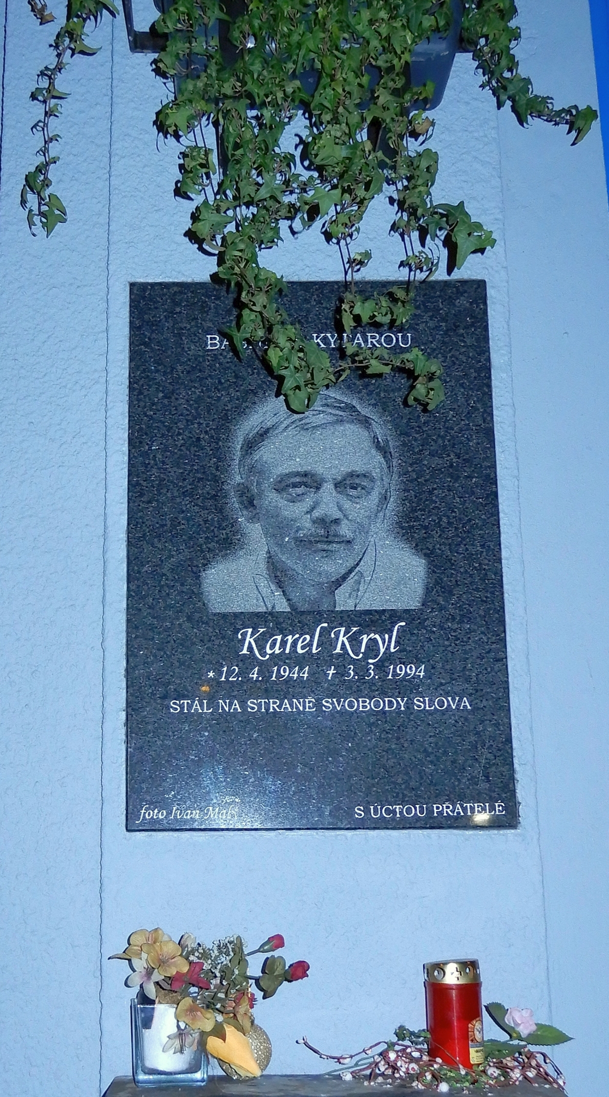 Poslední bydliště Karla Kryla, dům čp. 479-II, třída Milady Horákové 75, Praha 7- Holešovice